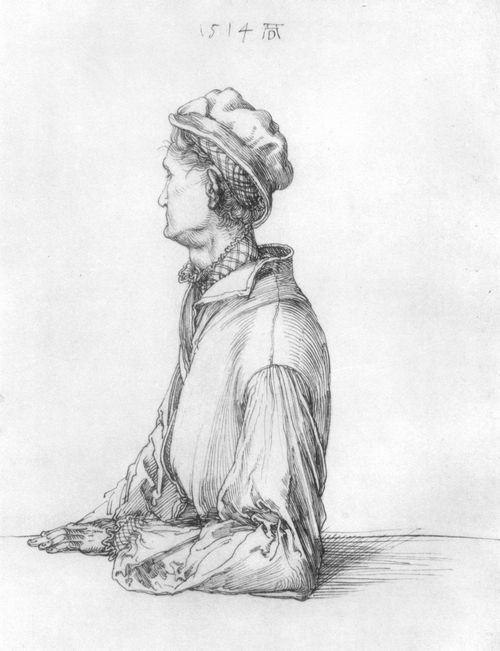 Портрет Эндреса Дюрера работы Альбрехта Дюрера